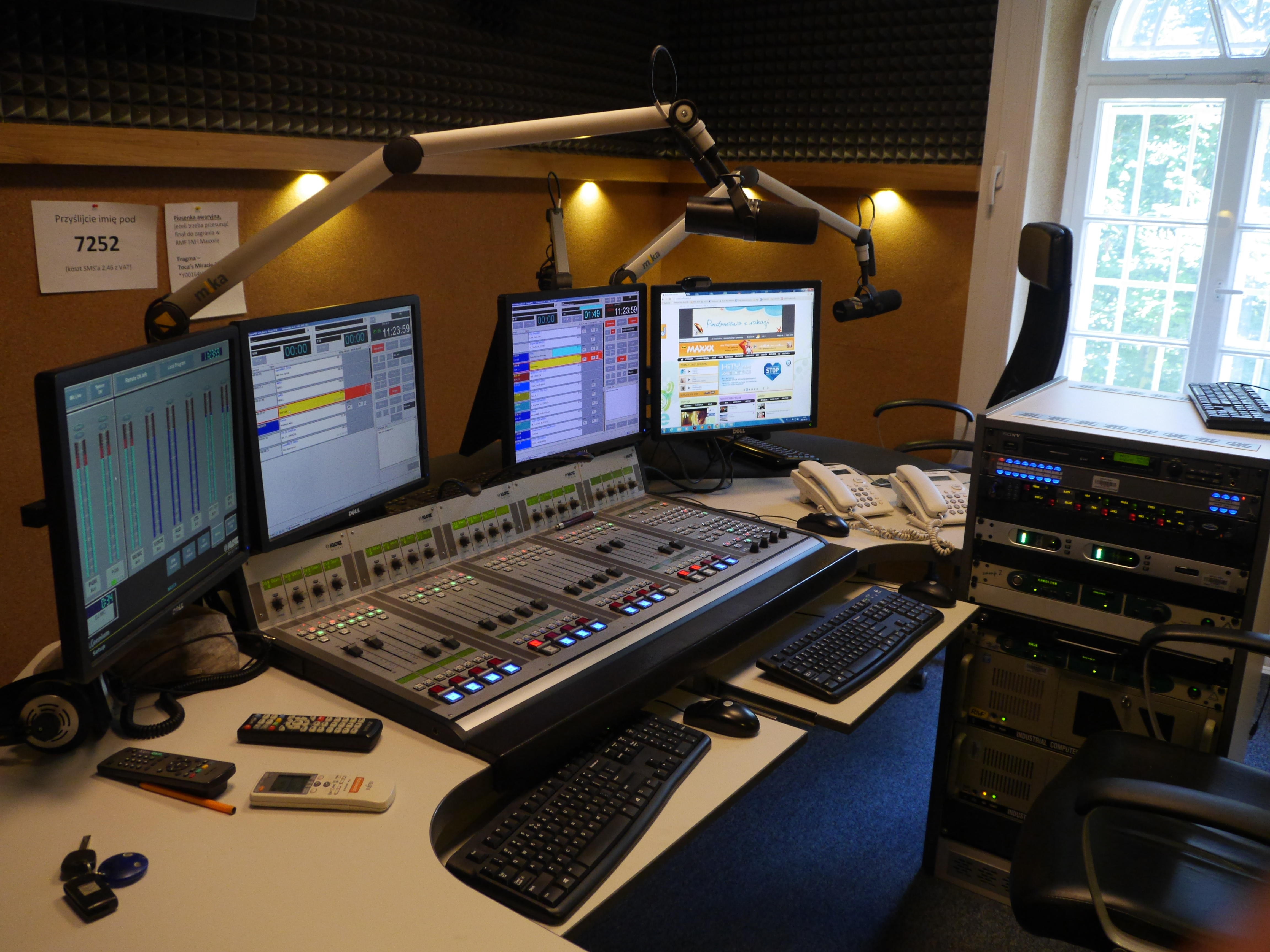 Siedziba radia RMF FM, al. Waszyngtona 1, 30-204 Kraków This photo was taken with Panasonic Lumix DMC-GH3 camera, thanks to Panasonic. You can see all photographs in category: Taken with Panasonic Lumix DMC-GH3.